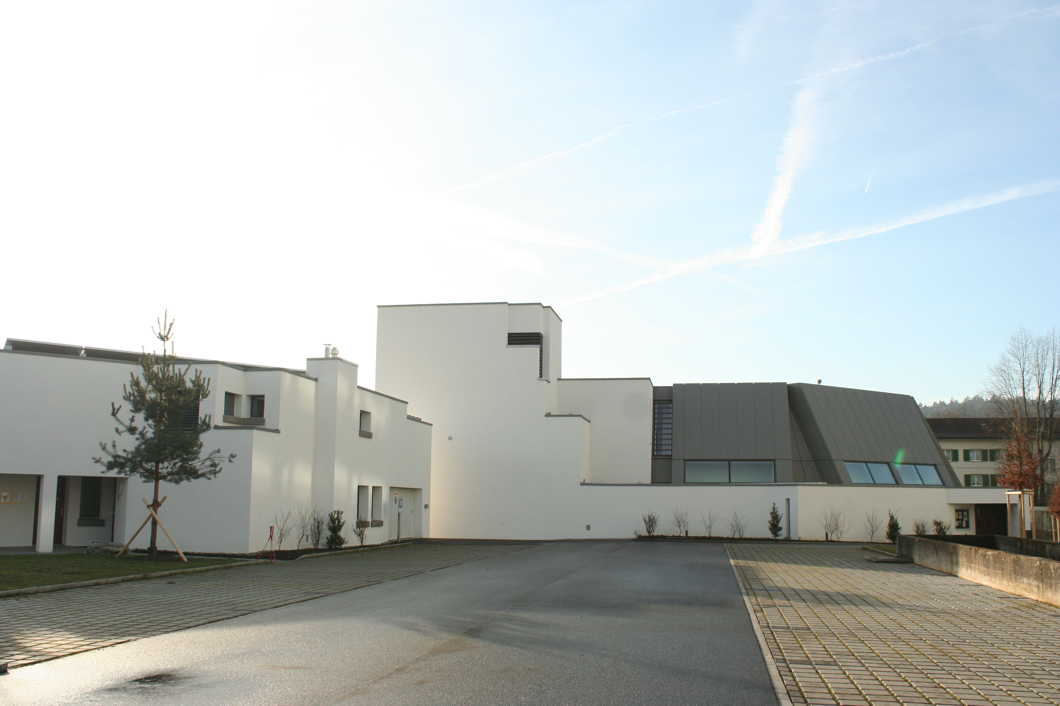 Römisch-katholische Pfarrkirche St. Ulrich Winterthur-Rosenberg, Ansicht von Norden